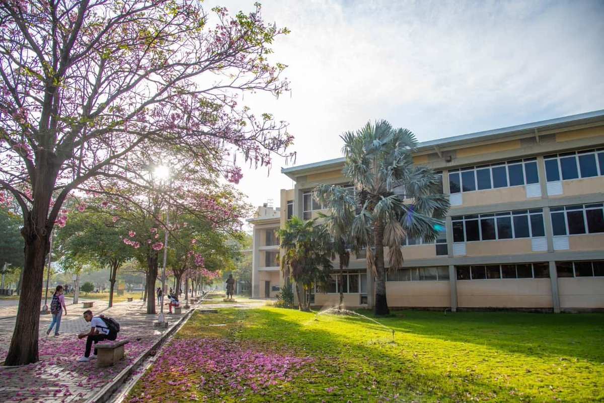 Sendero de Arboles